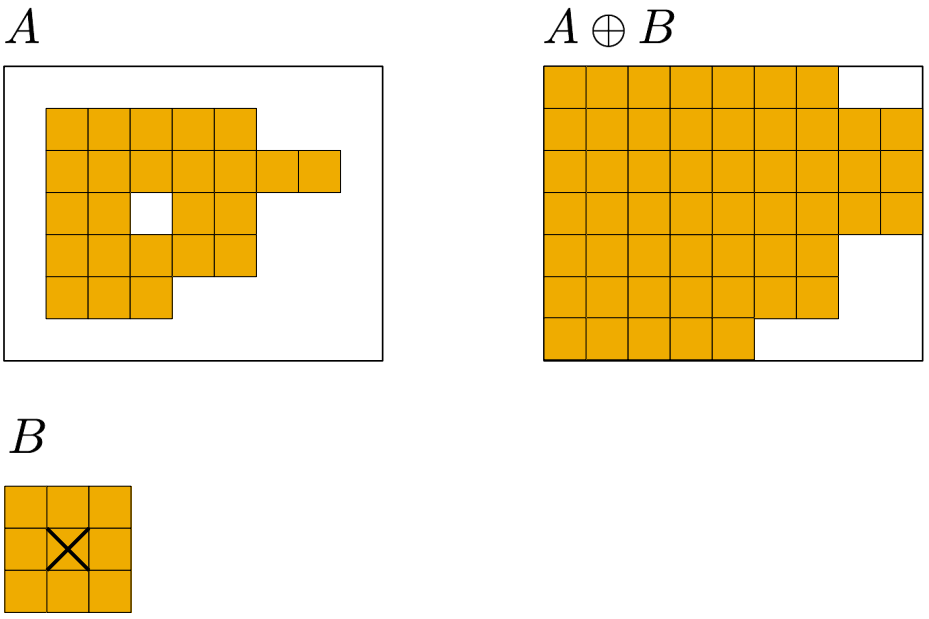 Een voorbeeld van een dilatatie uitgevoerd op een beeld met een structuur element.